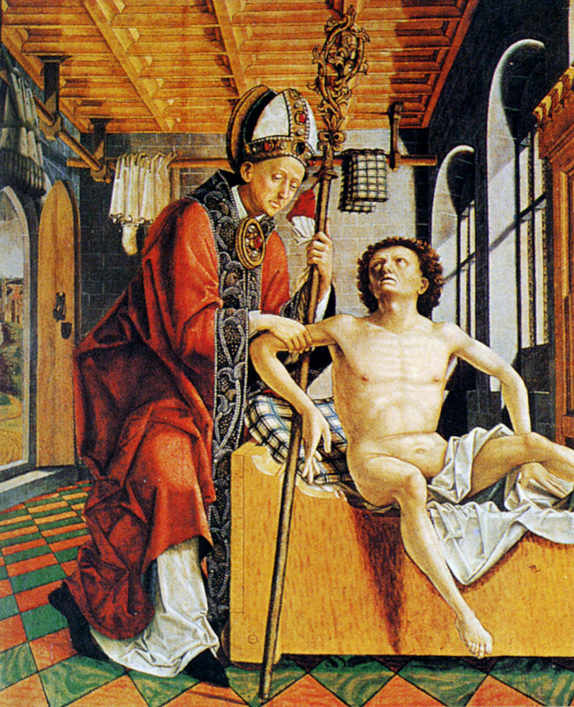 St. Augustine Freeing A Prisoner